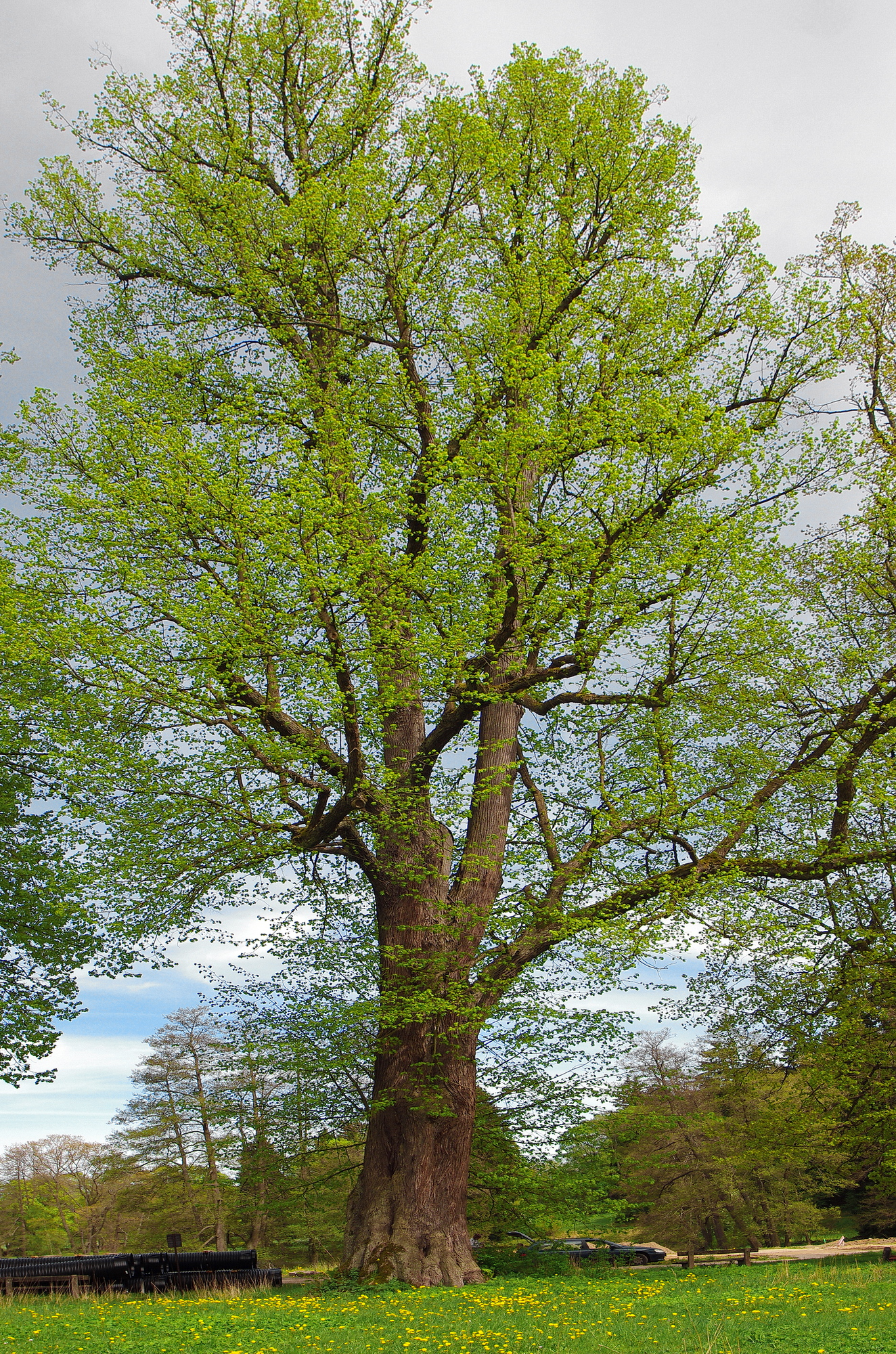 památný strom Hroznatova lípa, klášter Teplá, okres Cheb